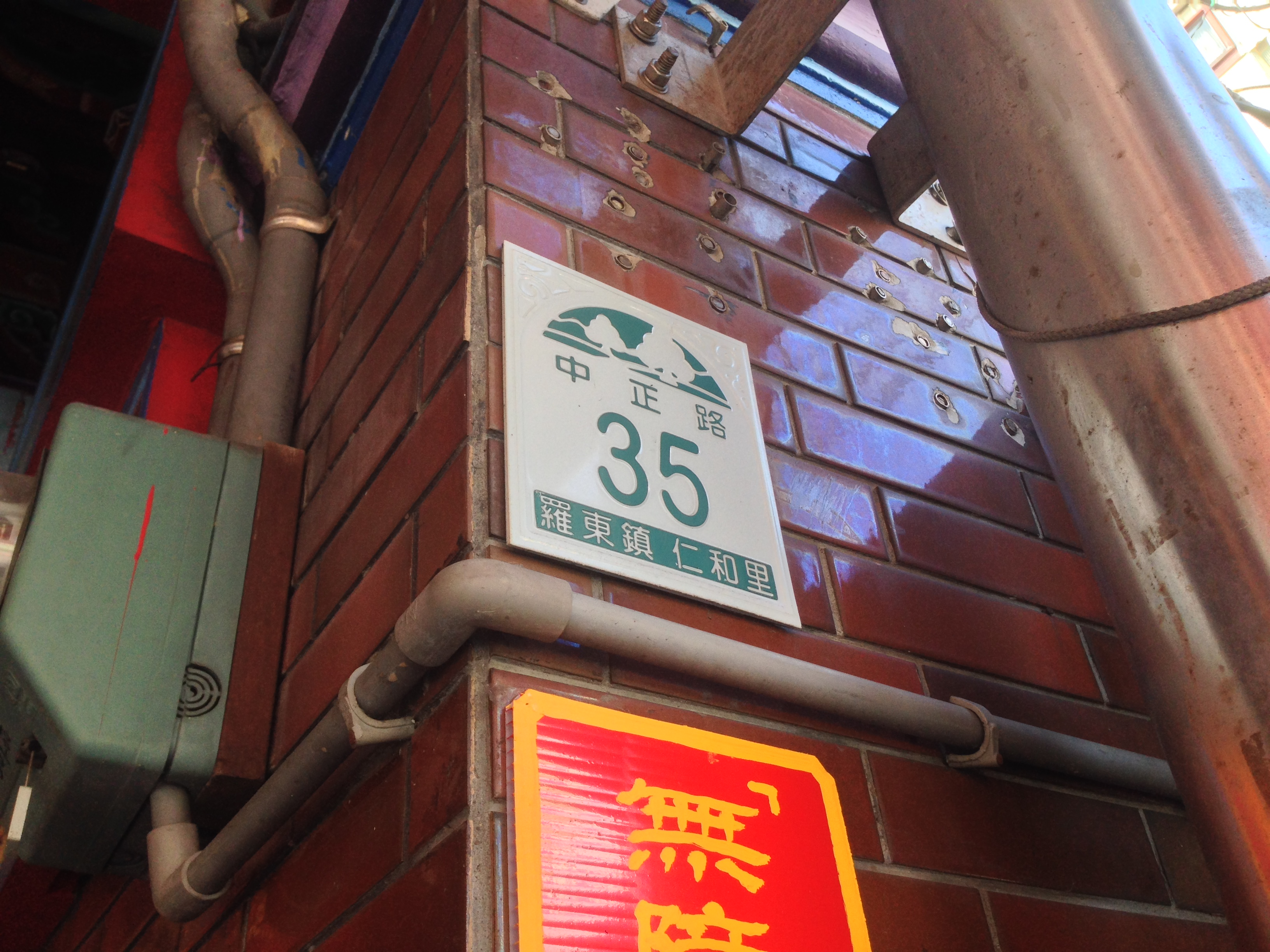 羅東震安宮門牌